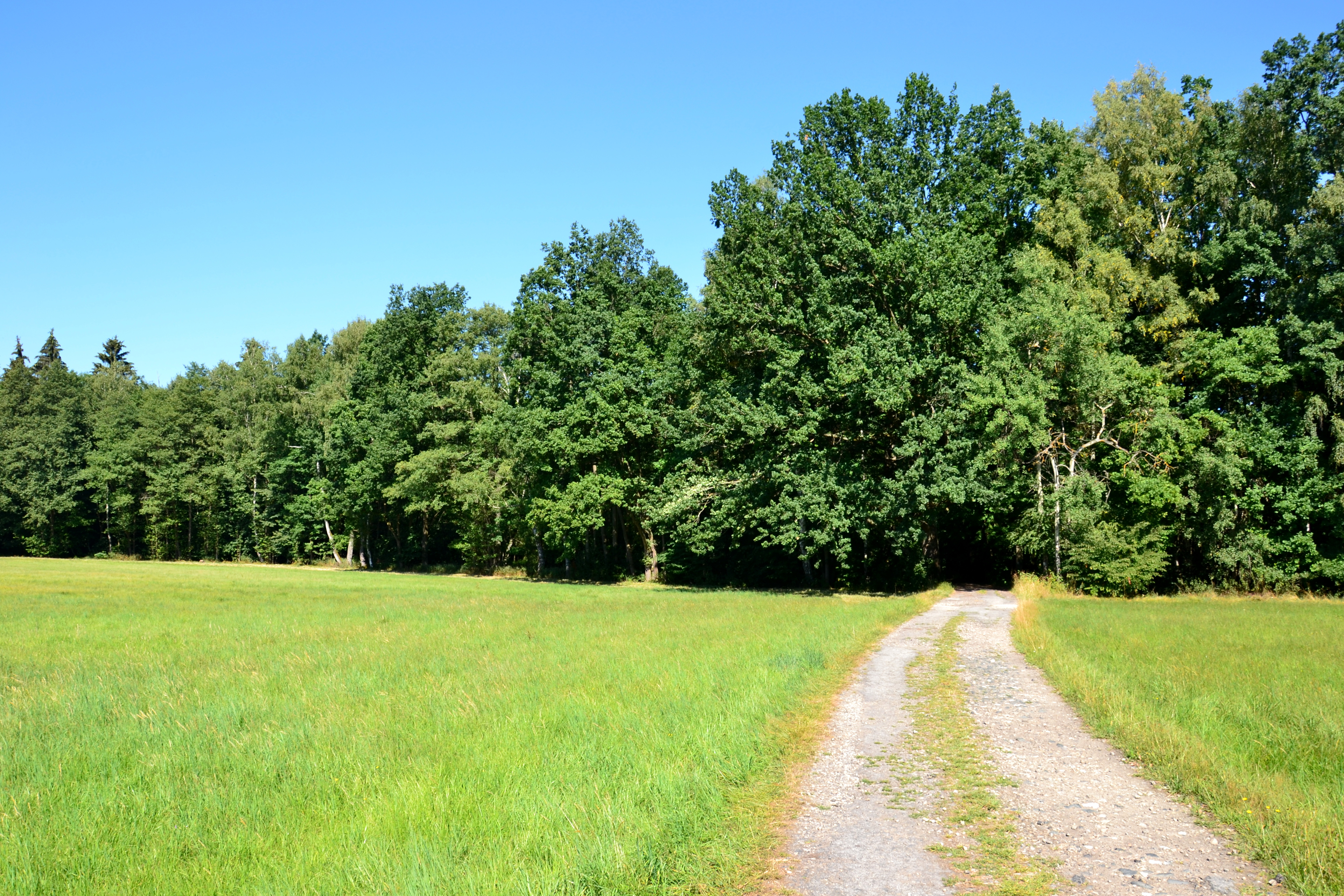 Louka na okraji chráněného území